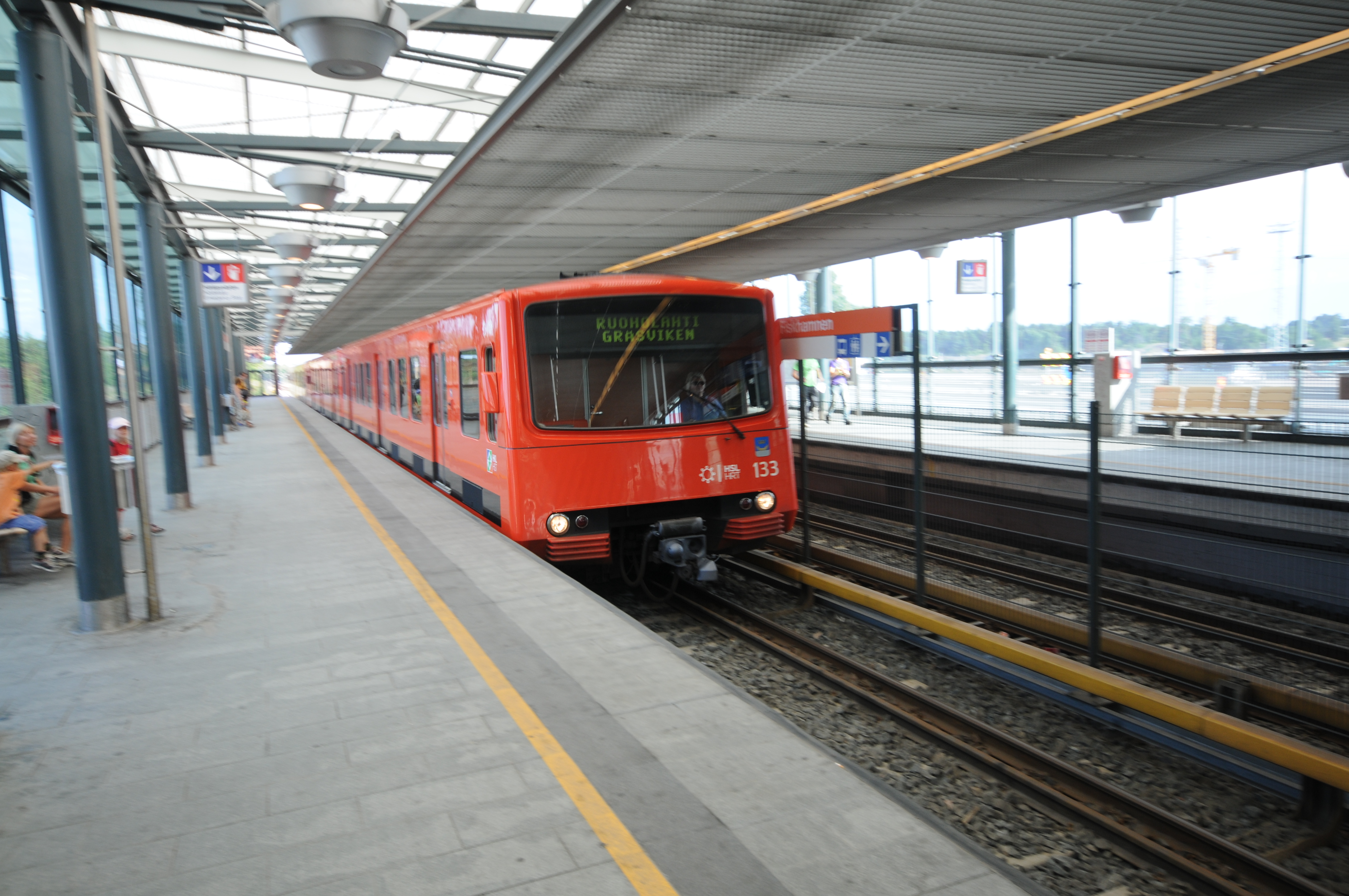 Helsinki